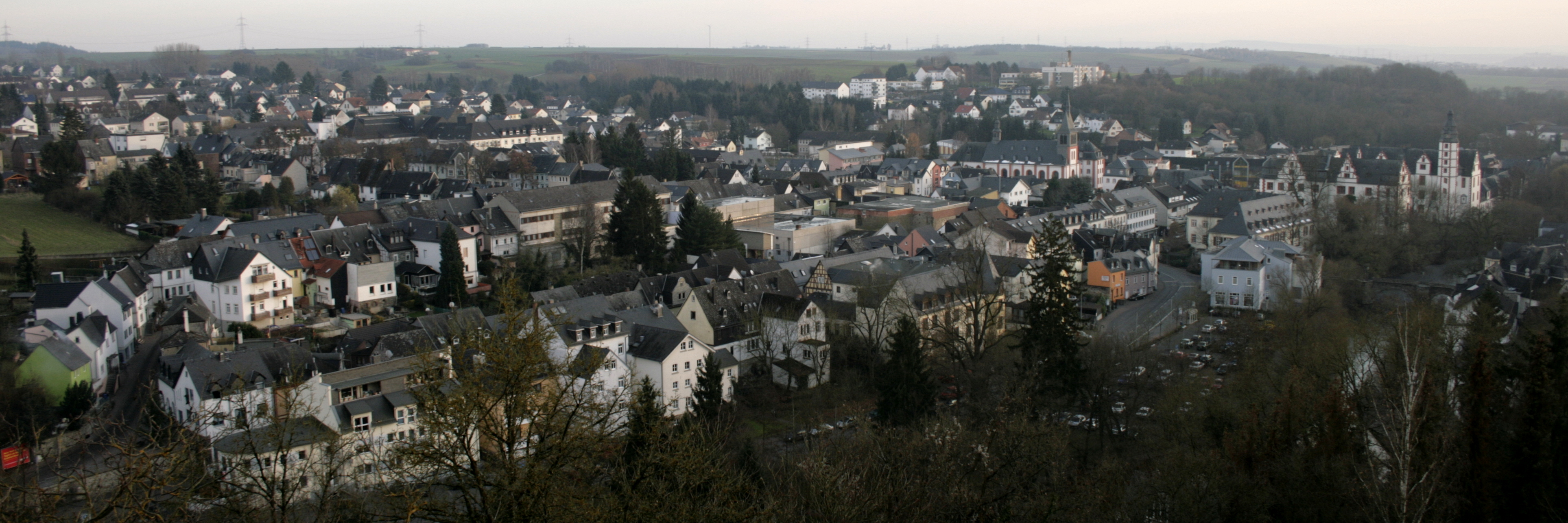 Blick auf die Altstadt von Hadamar, Deutschland, vom Mönchberg aus Richtung Westen